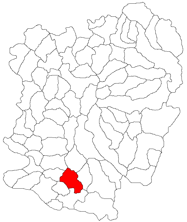 Categorie:Hărţi ale judeţului Caraş-Severin